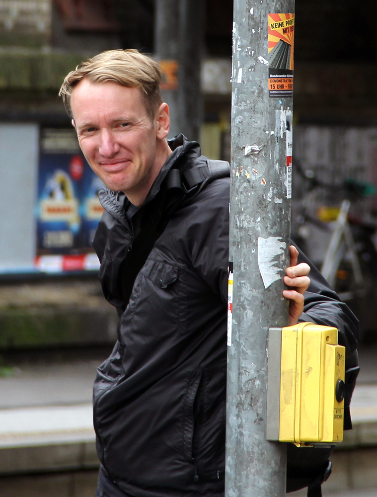 Hendrik Beikirch in Köln im Rahmen der City Leaks 2013 aufgenommen.